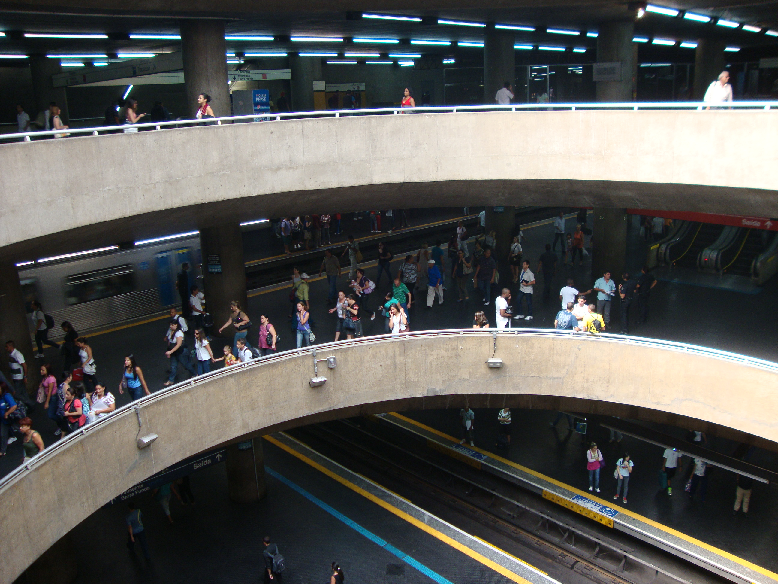 Estação da Sé